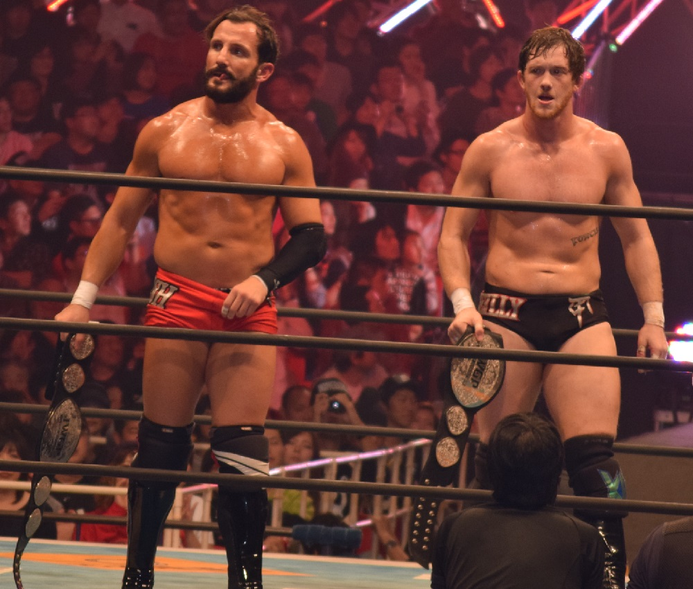 2015年11月7日 大阪府立体育会館 「POWER STRUGGLE」 レッドラゴンのボビー・フィッシュ（左）とカイル・オライリー（右）